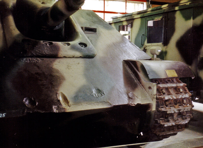 Beschreibung: Jagdpanther, die Bugplatte zeigt Beschussschäden